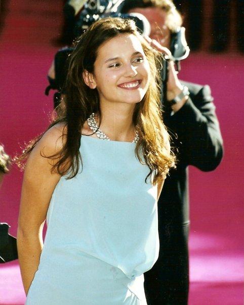 Virginie Ledoyen au festival de Cannes.